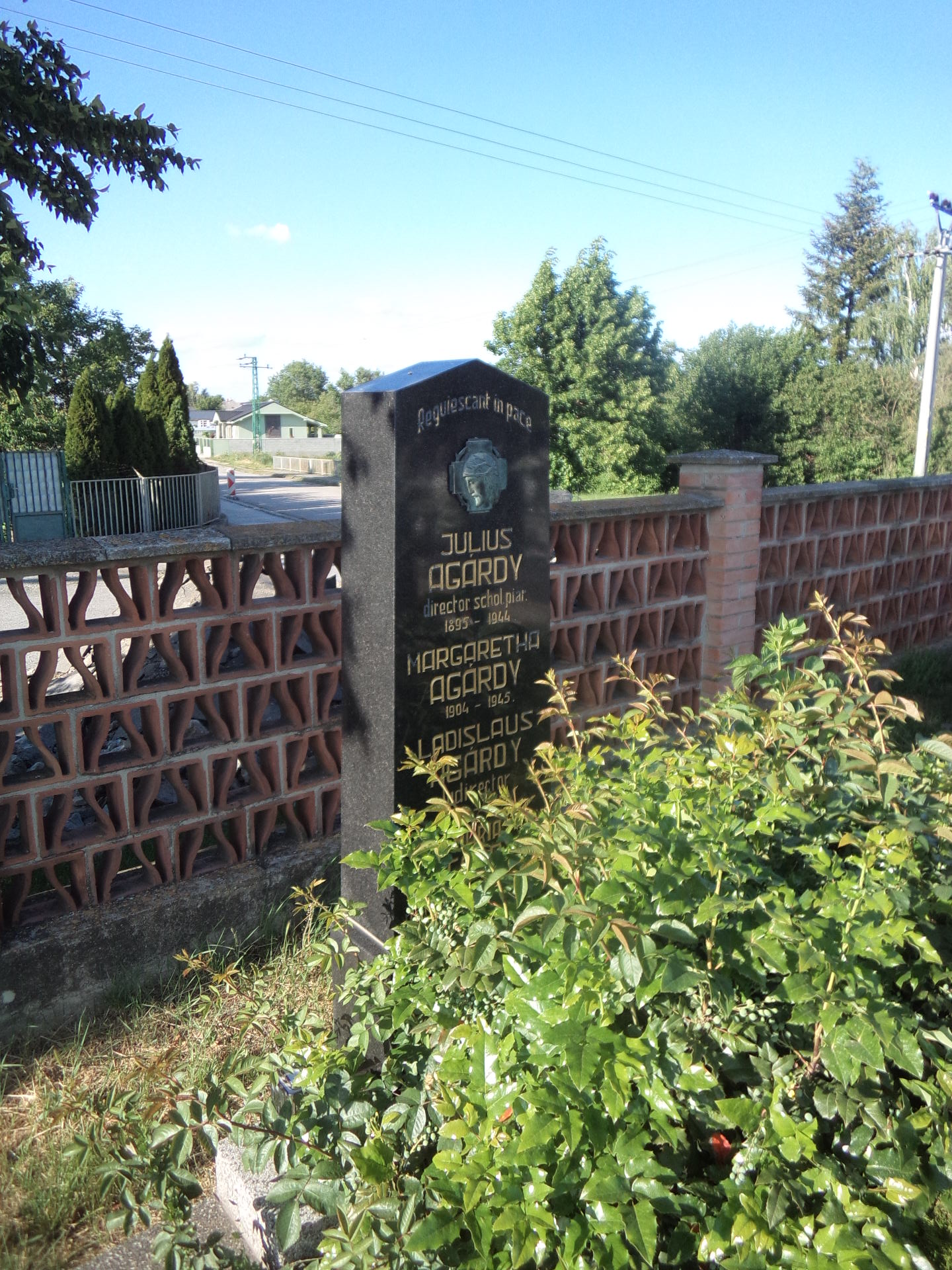 Agárdy Gyula sírja Verebélyen